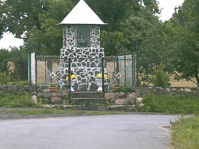 Kapliczka, Gać